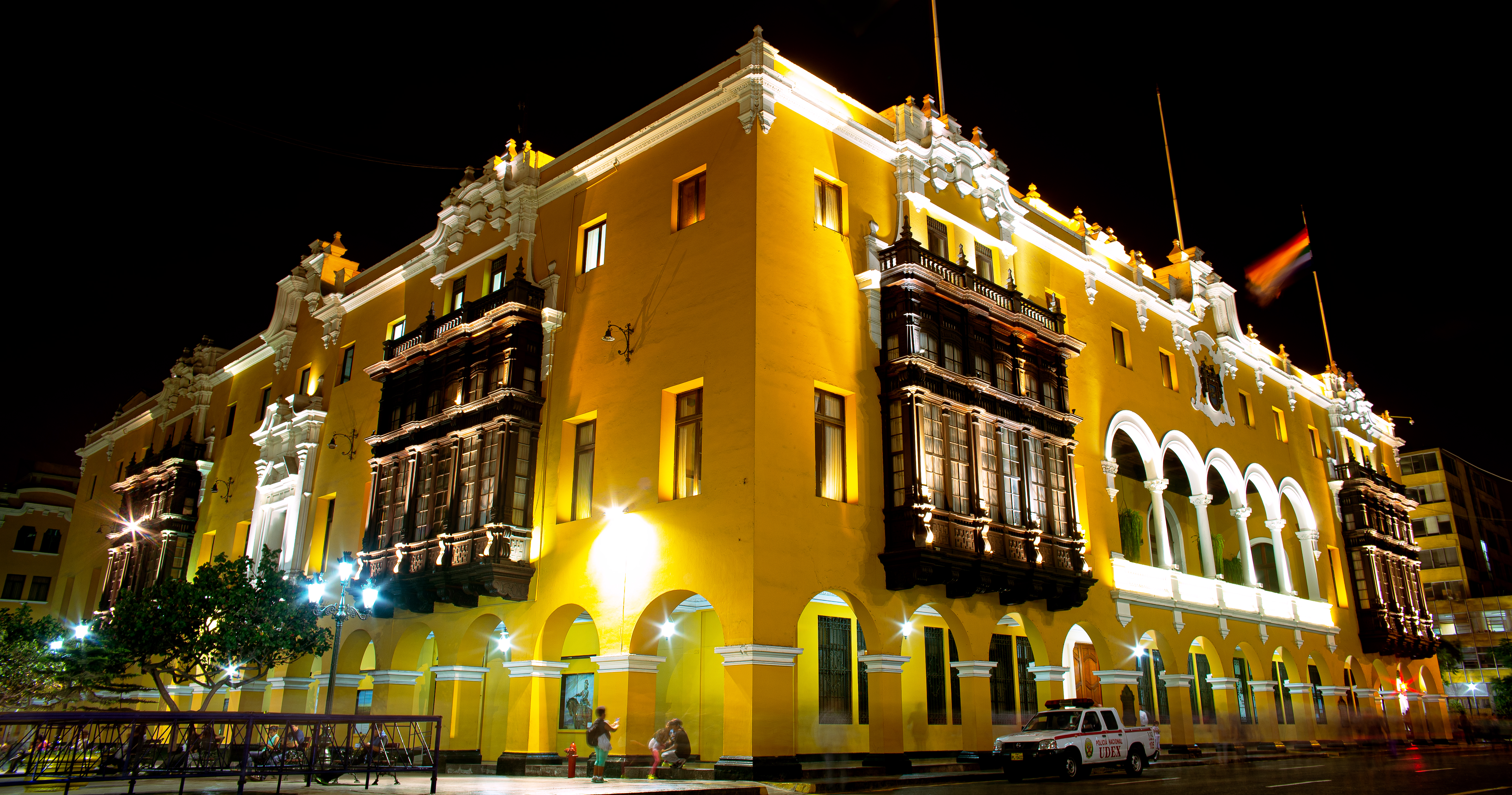 Municipalidad de Lima